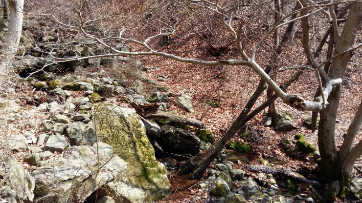 한국어 (조선): 경주시의 단석산에서 촬영한 사진.